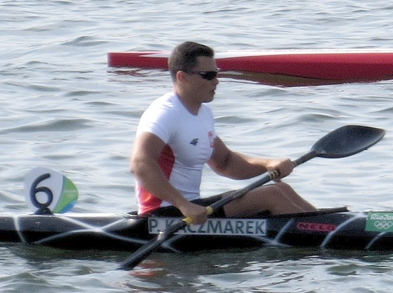 Rio 2016. Canoagem de velocidade.sx 05